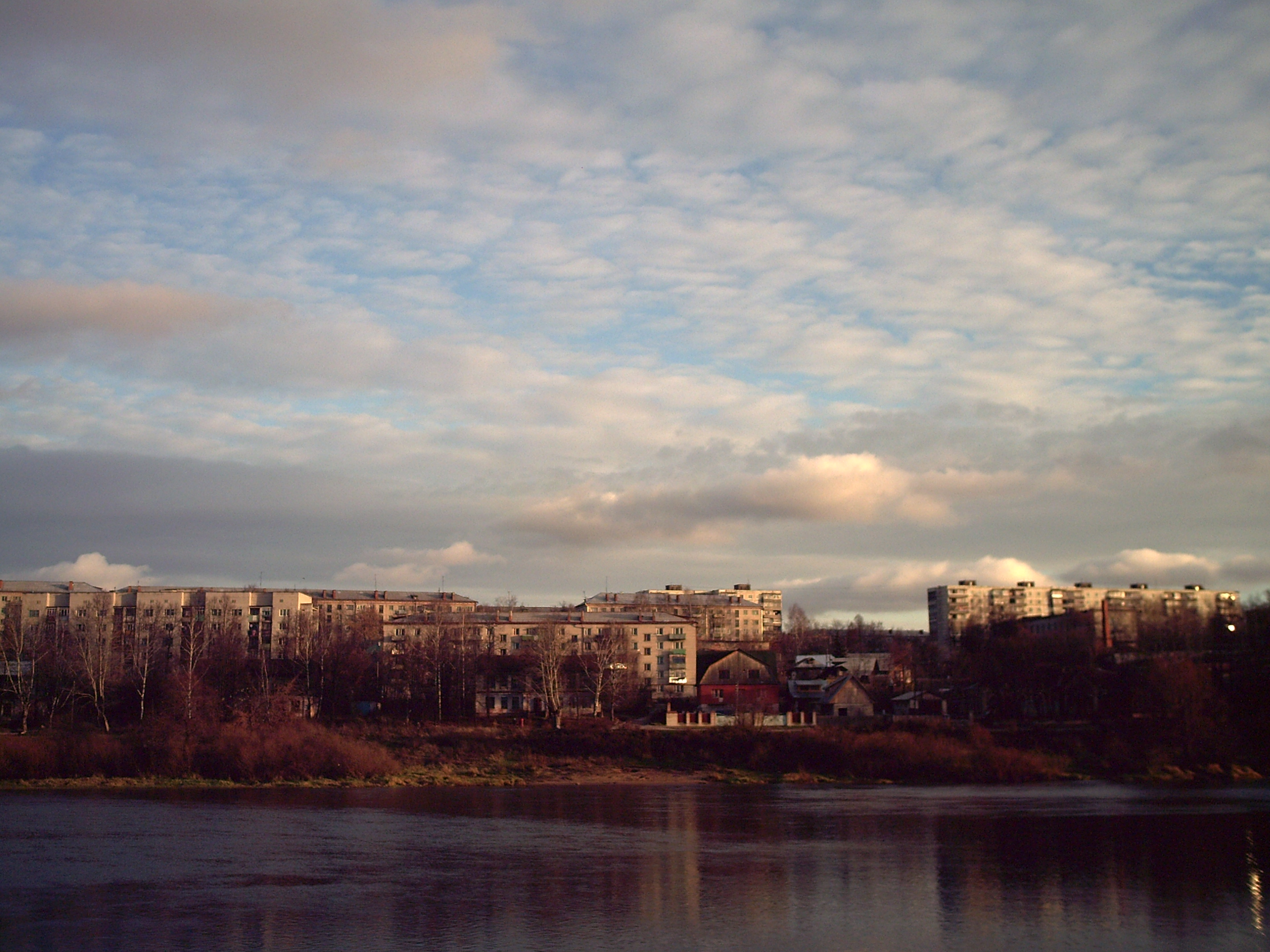 Ковровский заказник: Ковровский район, Владимирская область This image is related to the protected area of Russia number 3310138